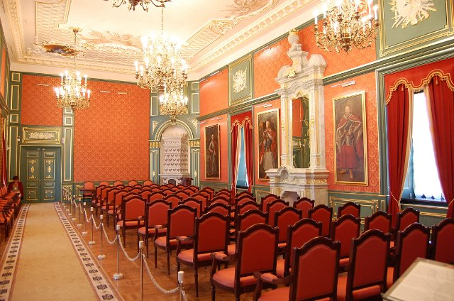 Sala hetmańska. Zamek w Nieświeżu